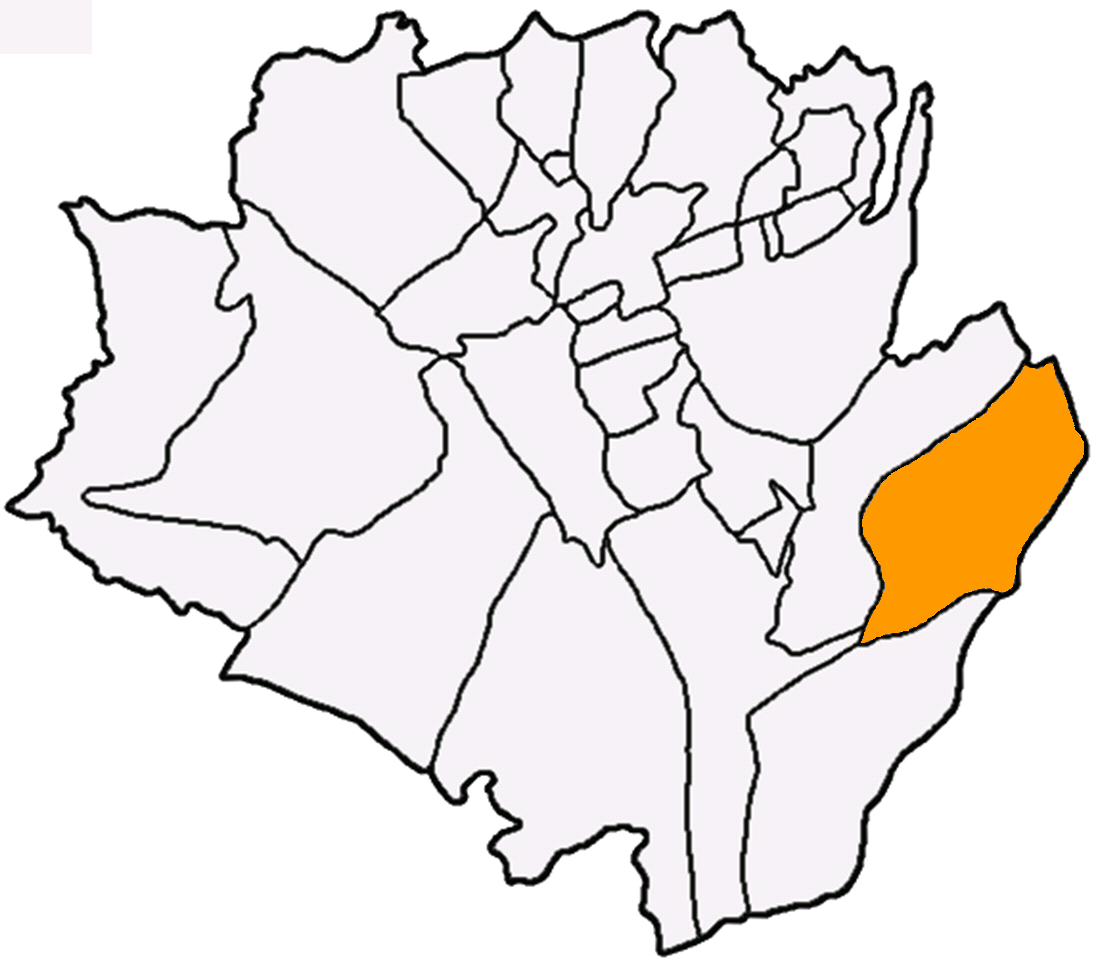 三坑里在龍潭區 (台灣)中的位置